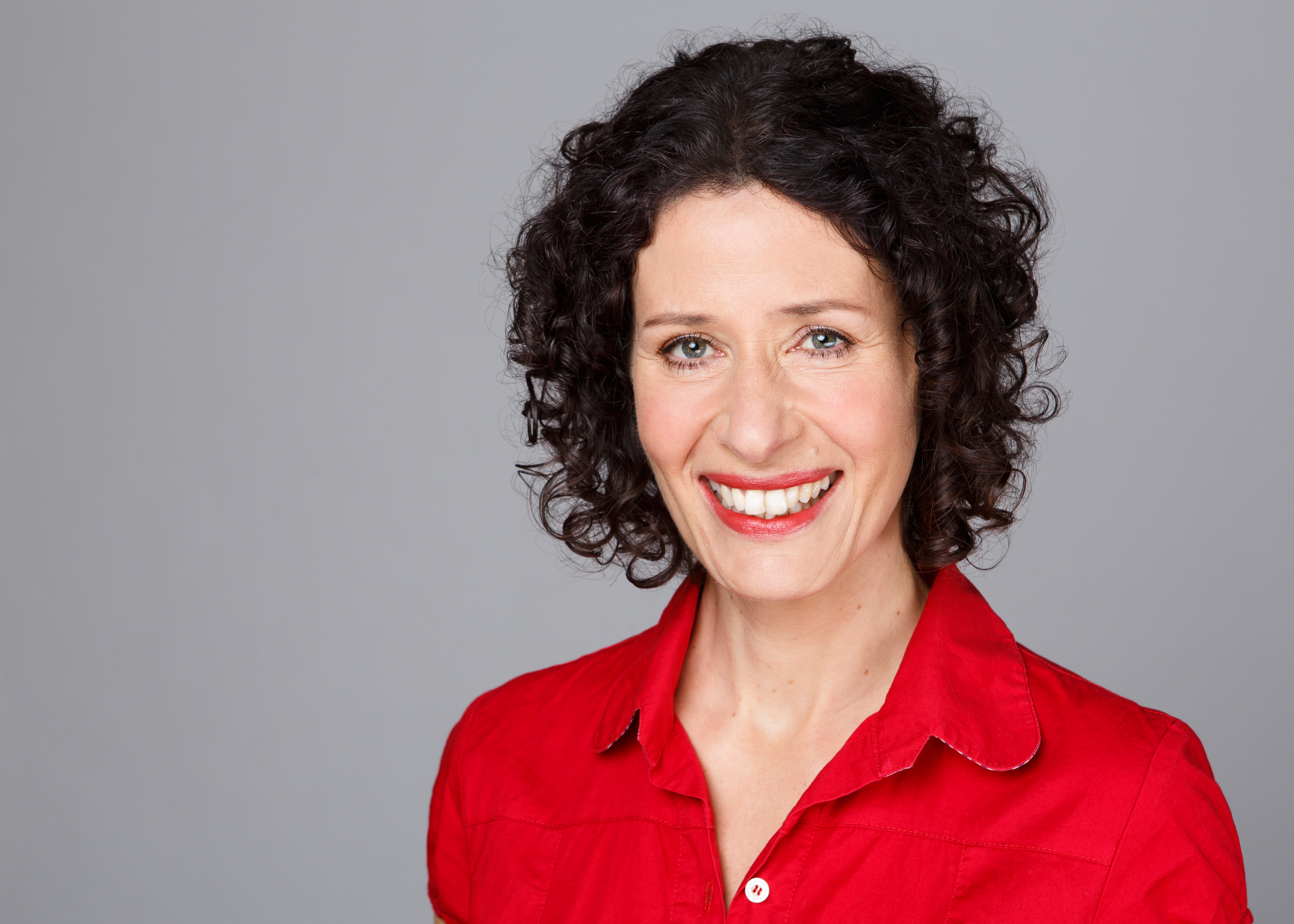 Bettina Jarasch, Politikerin von Bündnis90/Die Grünen